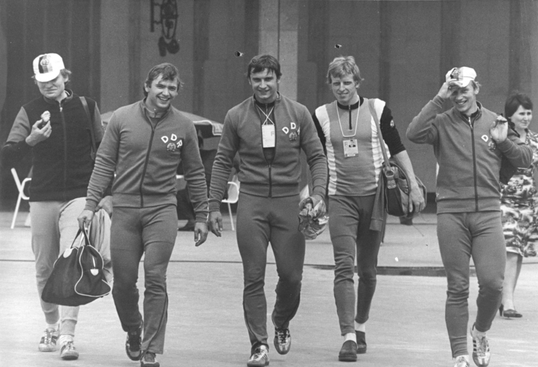 Olympia-Bahnradsportler der DDR 1980 in Moskau: Harald Wolf, Emanuel Raasch, Lutz Heßlich, Detlef Macha, Lothar Thoms